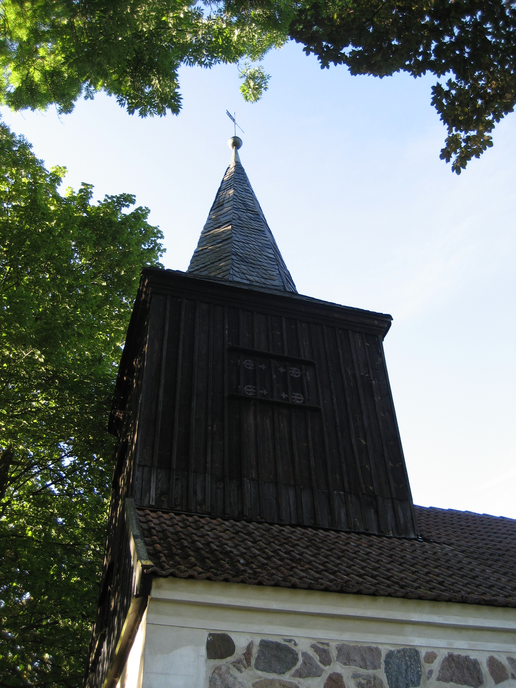 Kirchturm der Kirche Polzow.